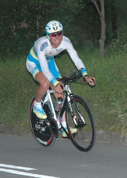 Oleg Chuzhda, Euskal Bizikleta 2007